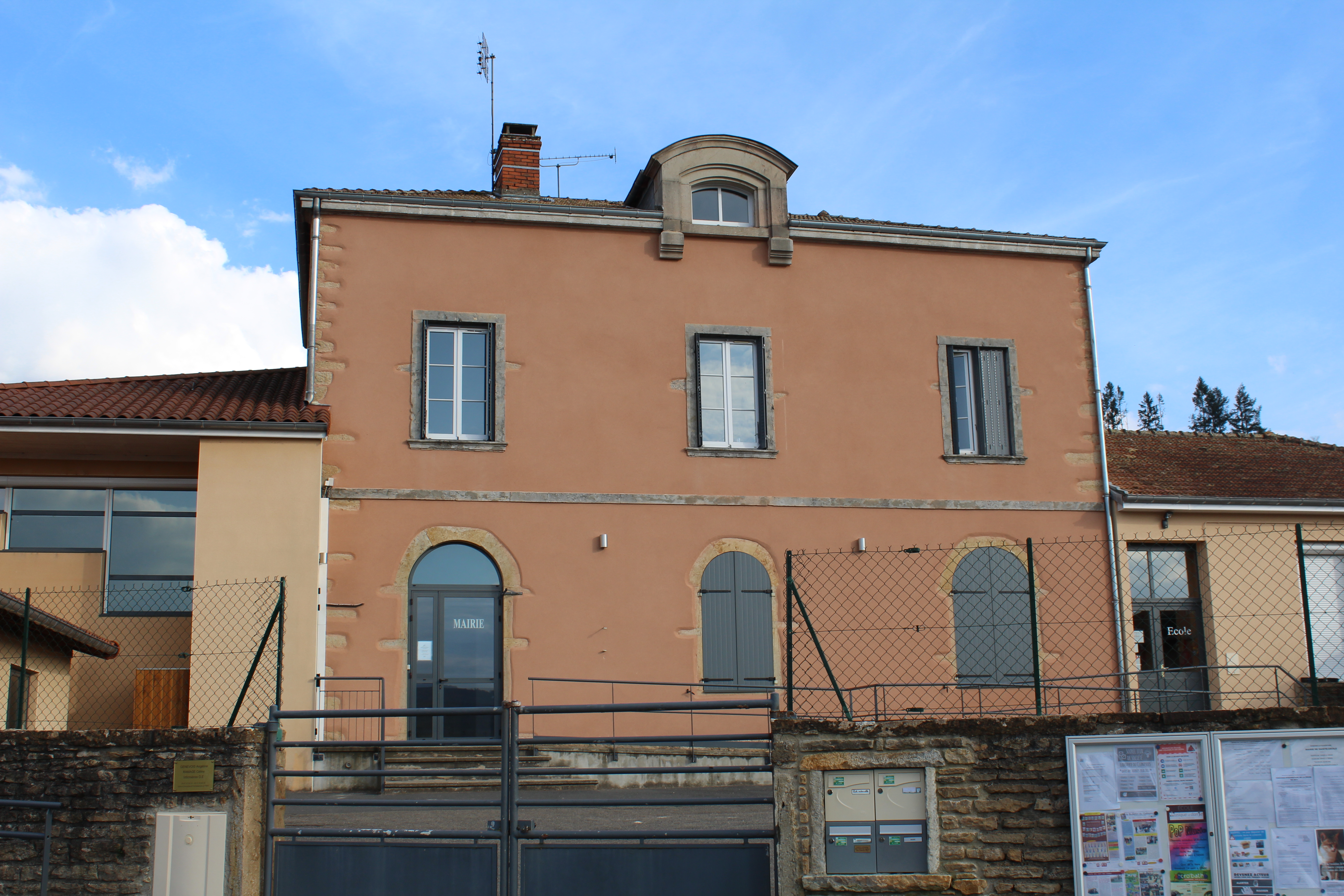 Mairie de Sainte-Cécile, Saône-et-Loire.